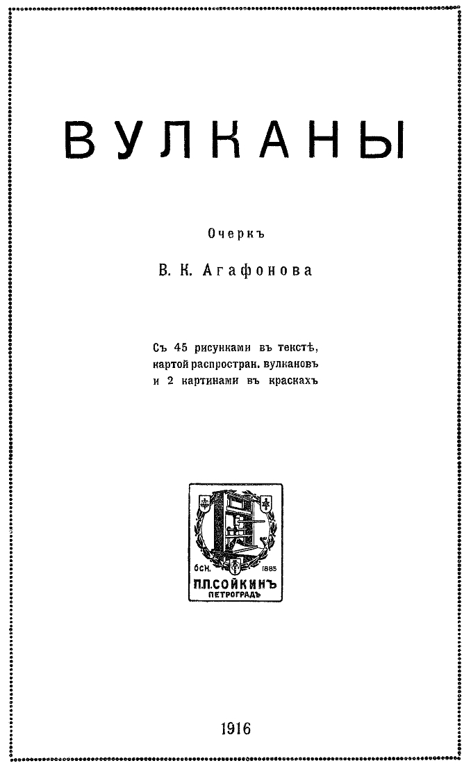 Обложка книги: Агафонов В. К. Вулканы. Петроград.: тип. П.П. Сойкин, 1916. 40 с.